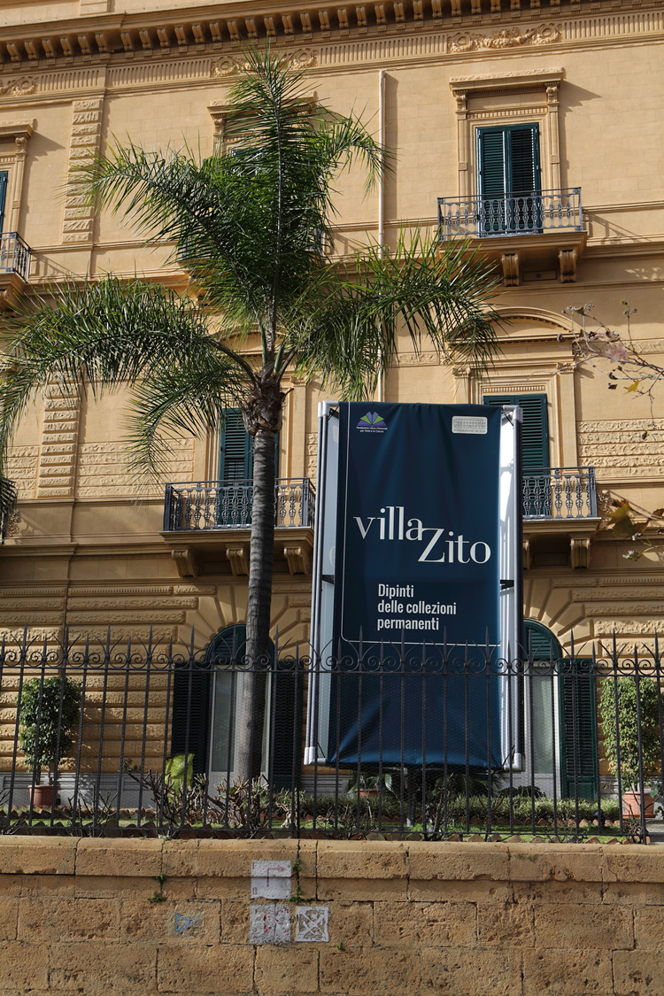 Veduta della facciata pricipale